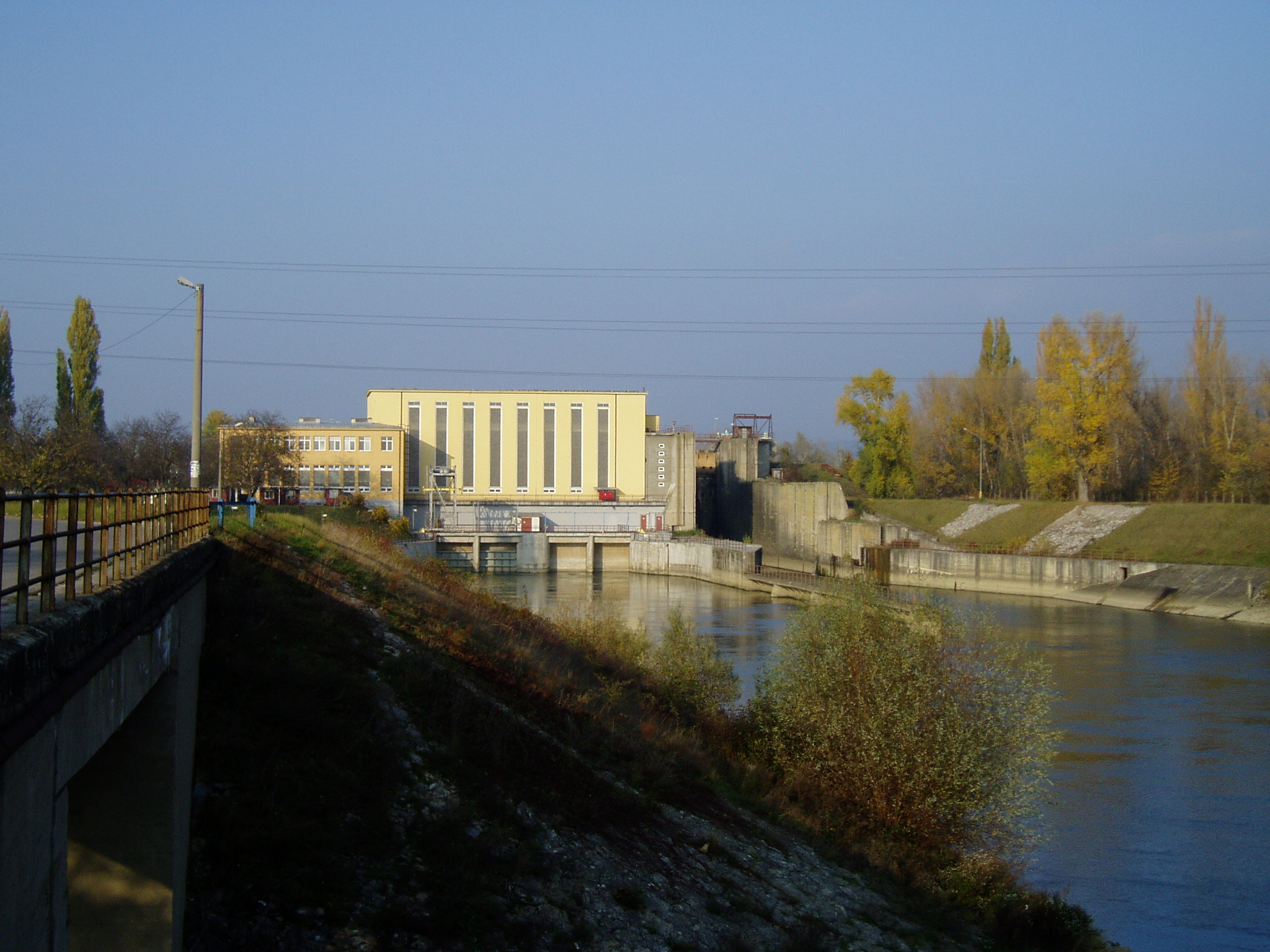 Elektráreň 1